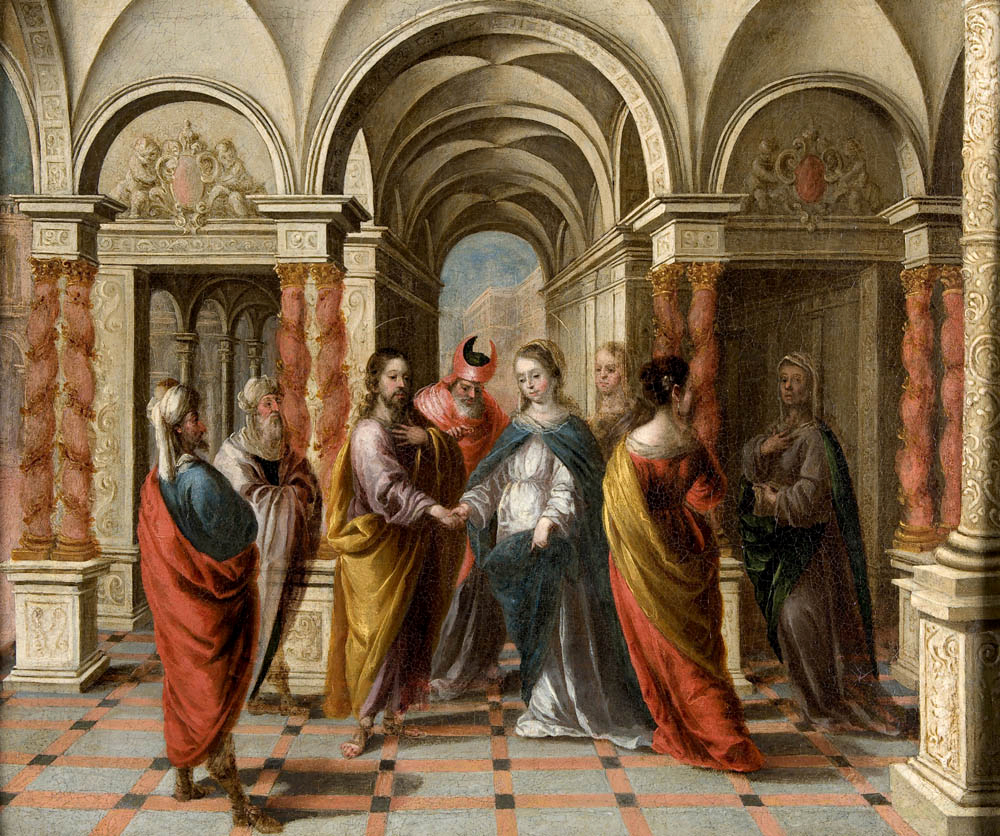 Desposorios de la Virgentitle QS:P1476,es:"Desposorios de la Virgen" label QS:Les,"Desposorios de la Virgen"